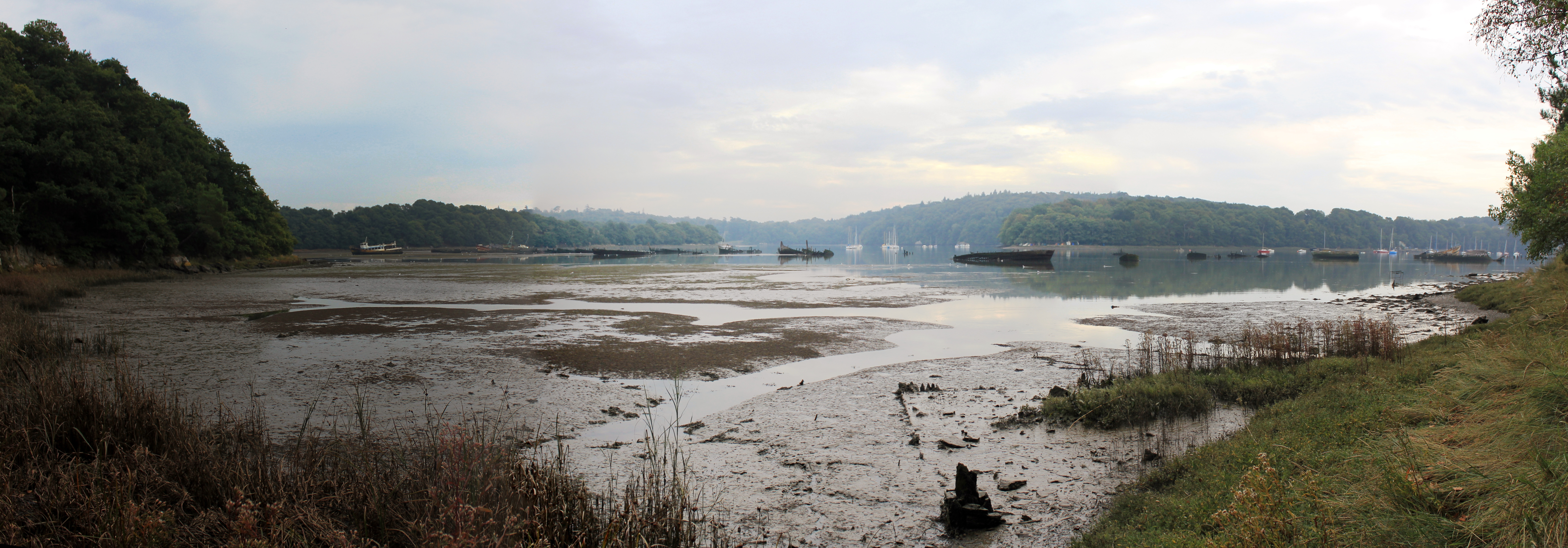 Panorama cimetière de bateaux de Lanester, dans un méandre du Blavet